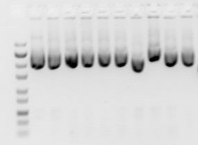 Plasmid miniprep. 0.8% agarose gel, ethidium bromide-stained.